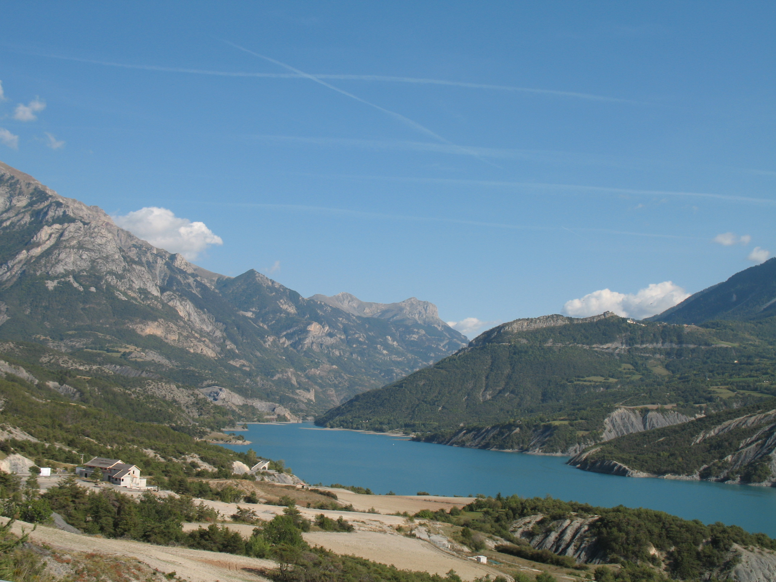 Lac de Serre-Ponçon